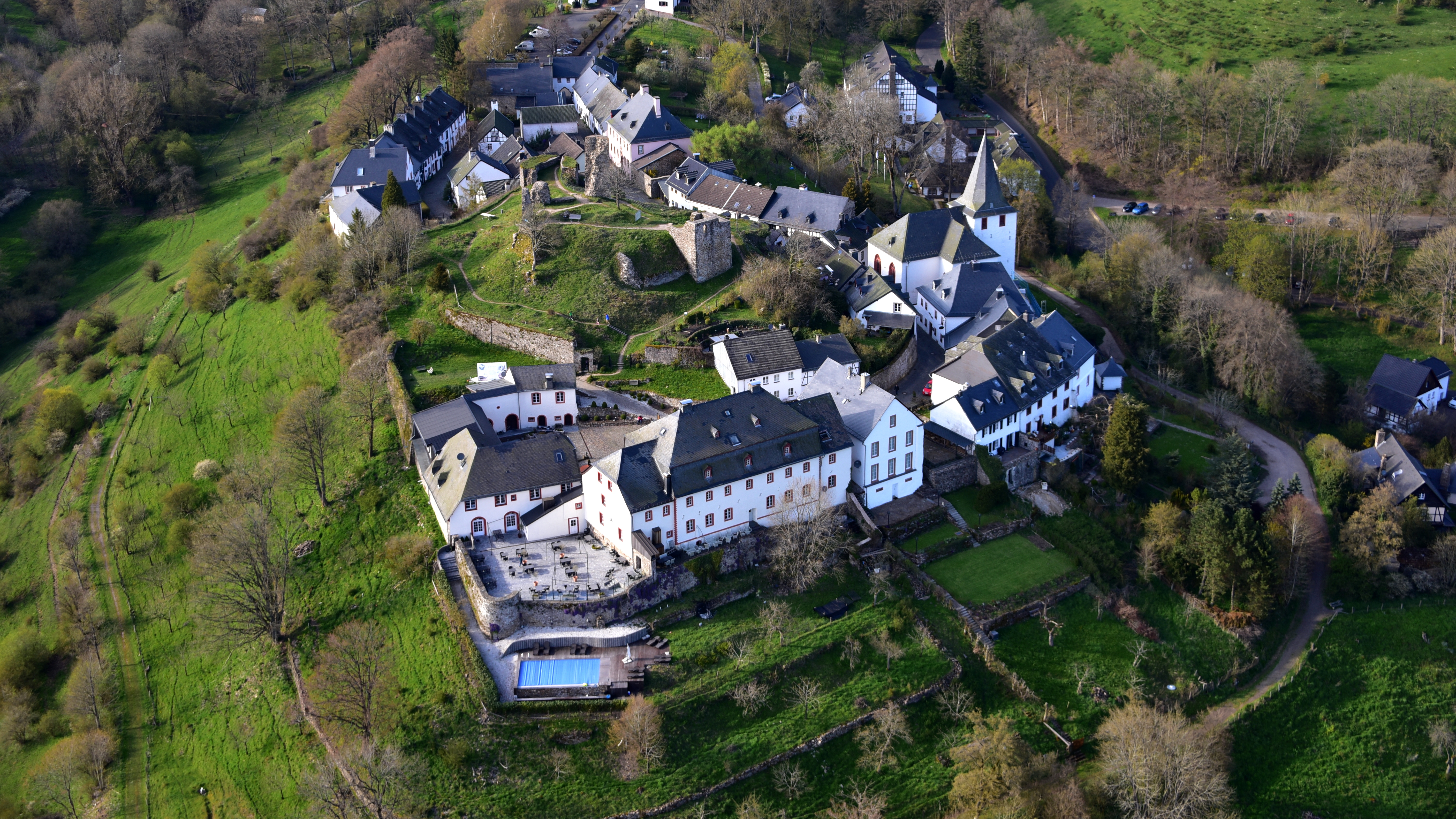 Kronenburg, Luftaufnahme (2016)